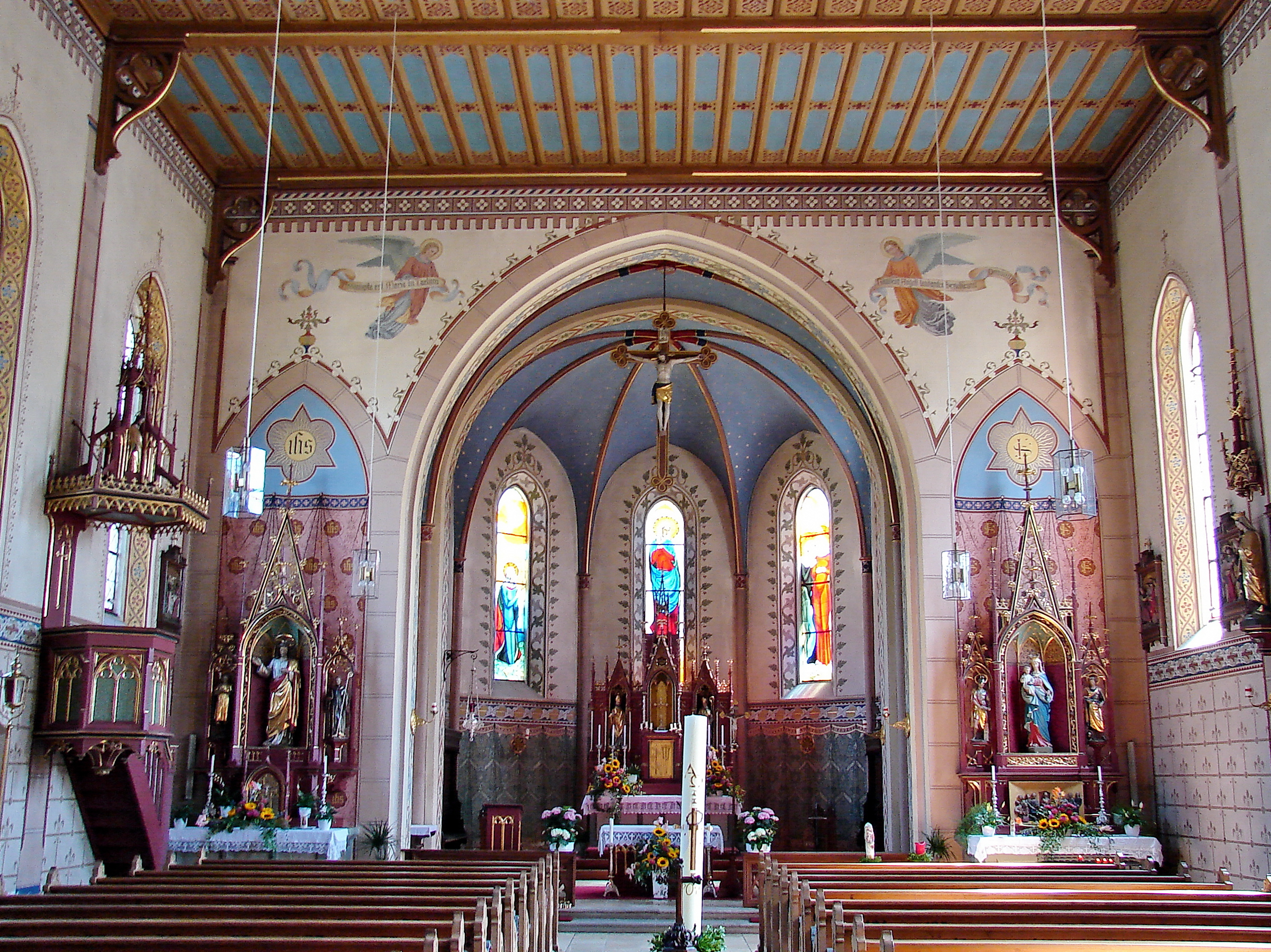 Die Pfarrkirche Maria Himmelfahrt in Bayerbach bei Ergoldsbach.